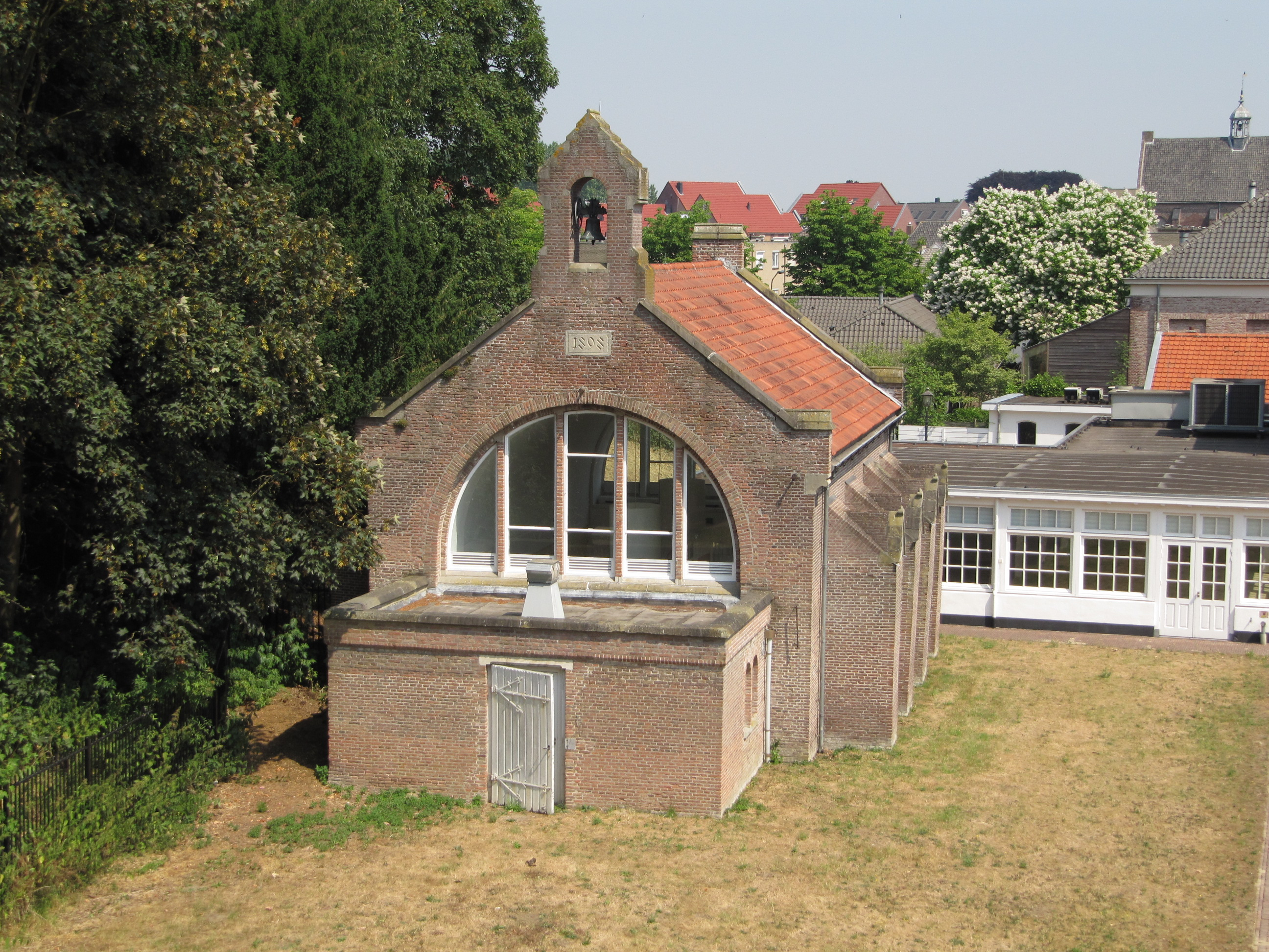 Grave - Kapel of kruithuis bij Arsenaal.jpg, rijksmonument